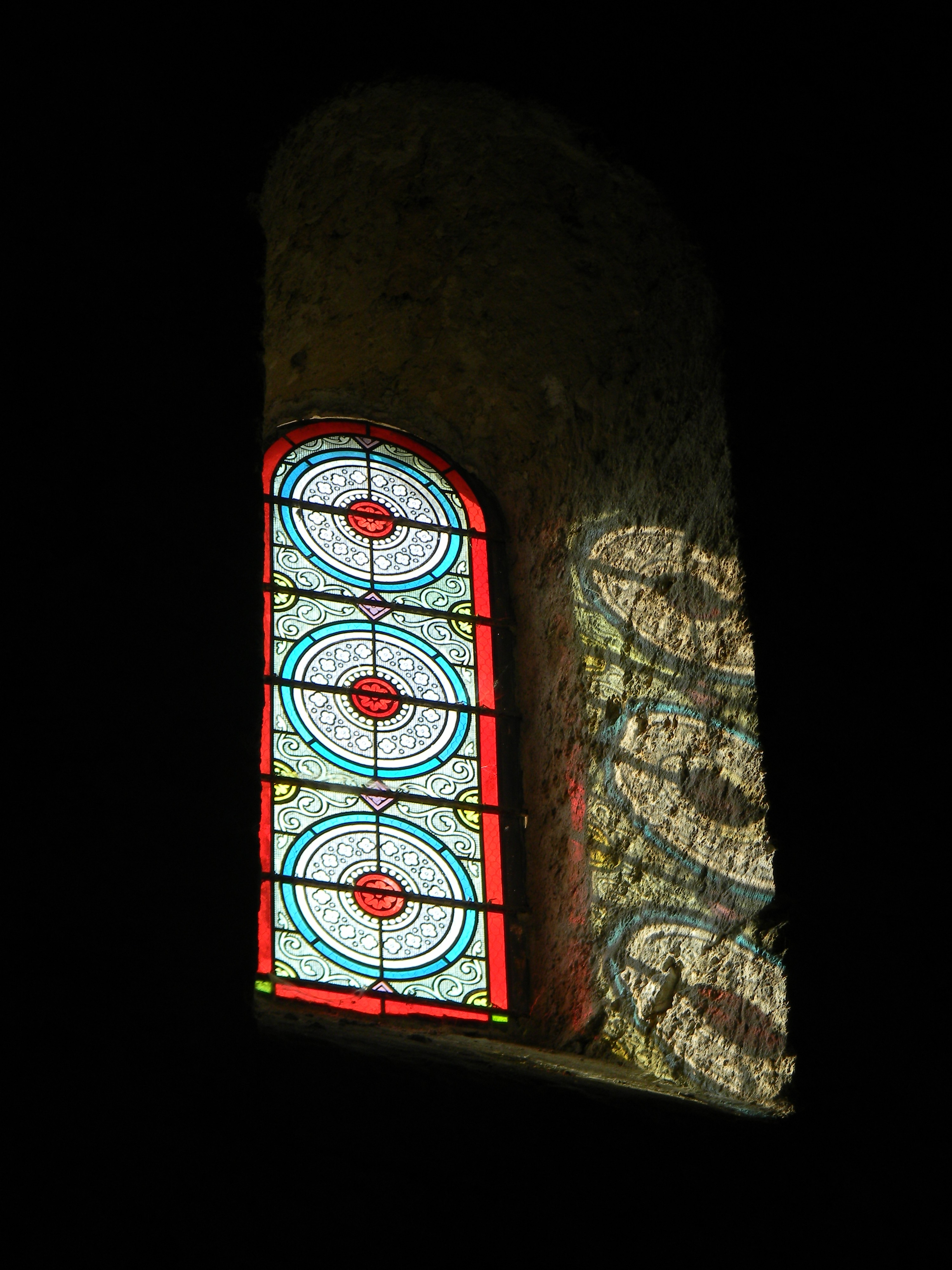 Une des trois ouvertures étroites de l'église Notre Dame de Brissarthe